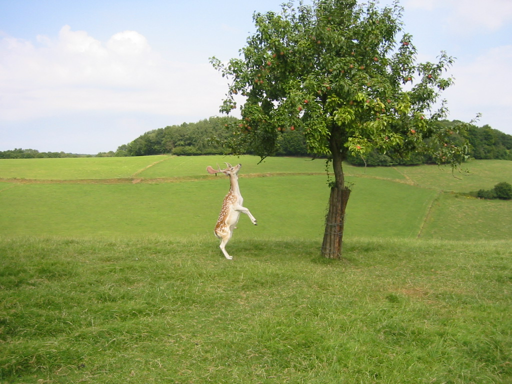 Eigen foto